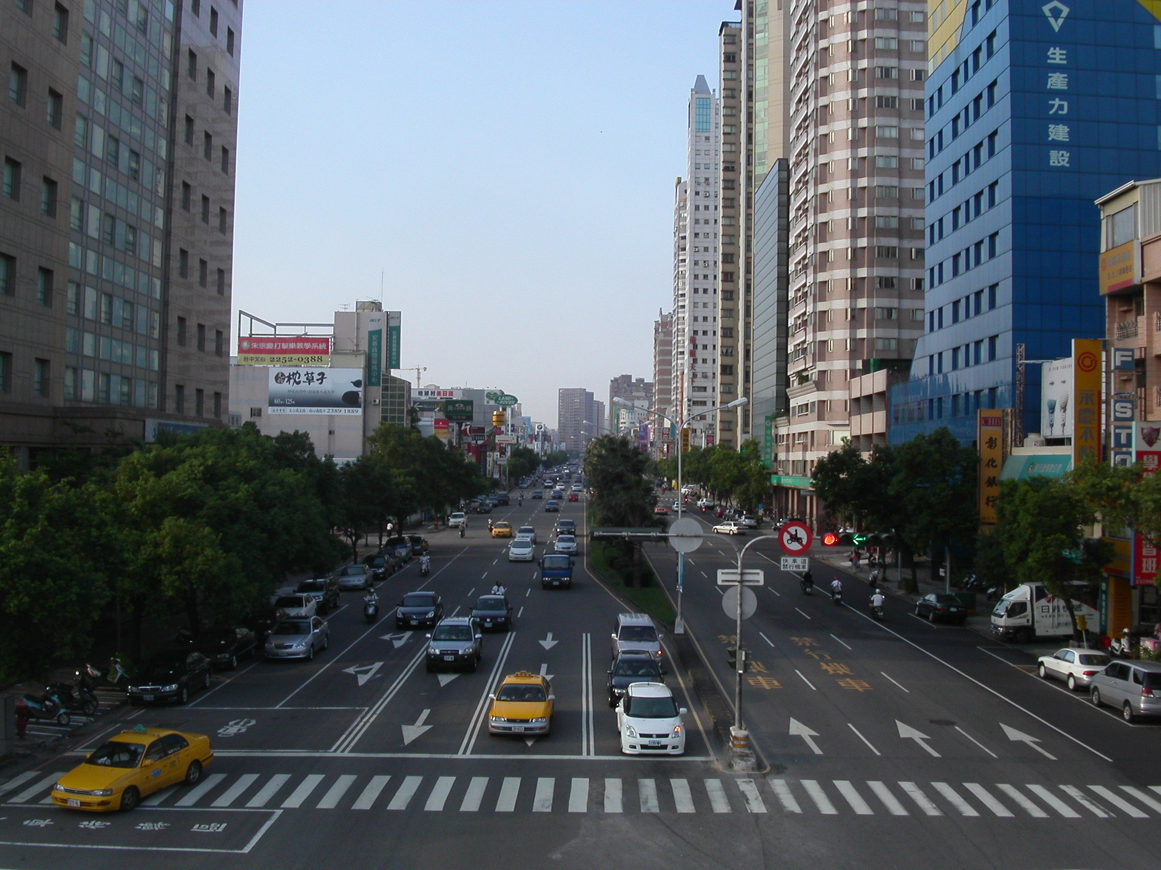 台中市文心路一段